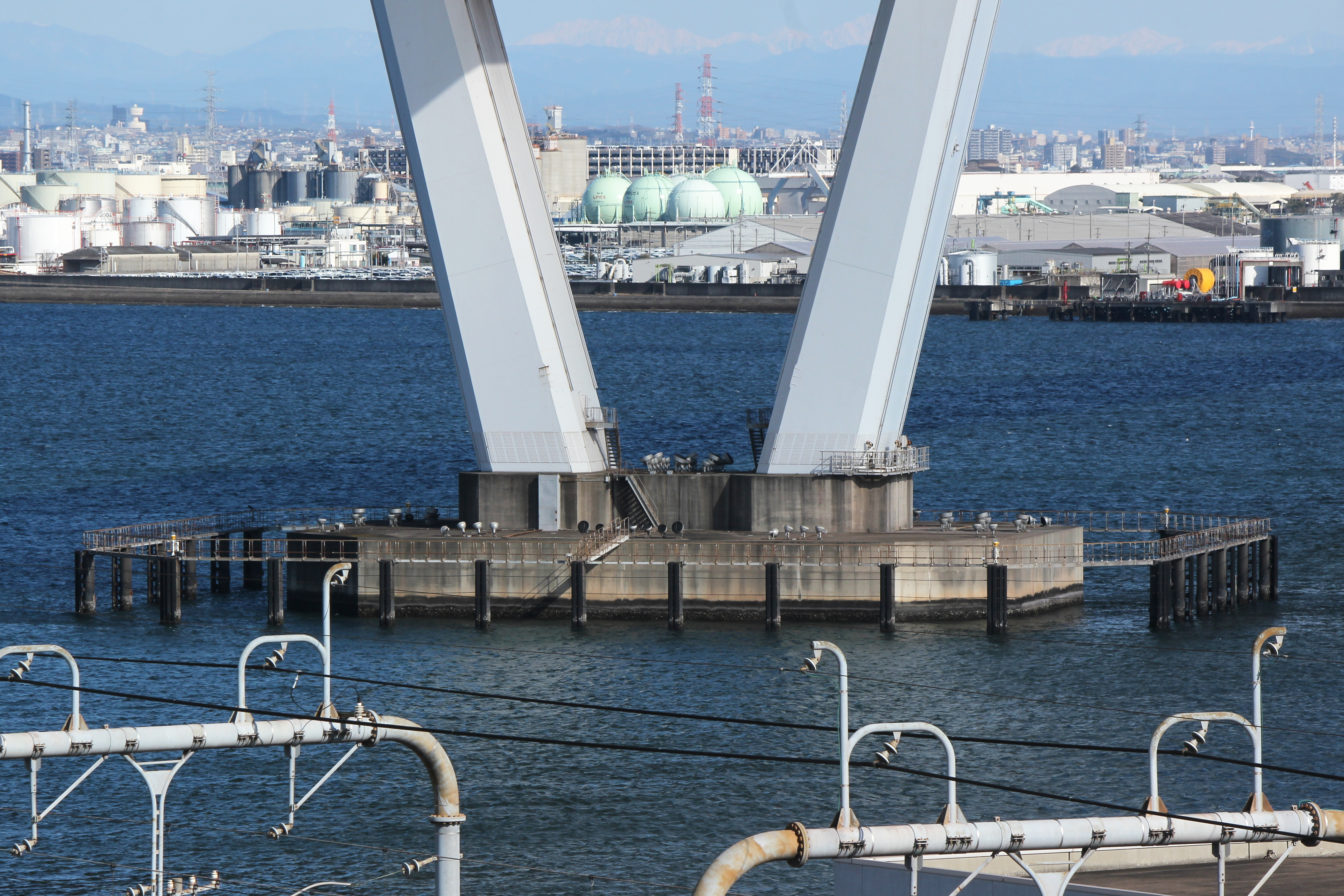 名港中央大橋の橋脚と防護柵